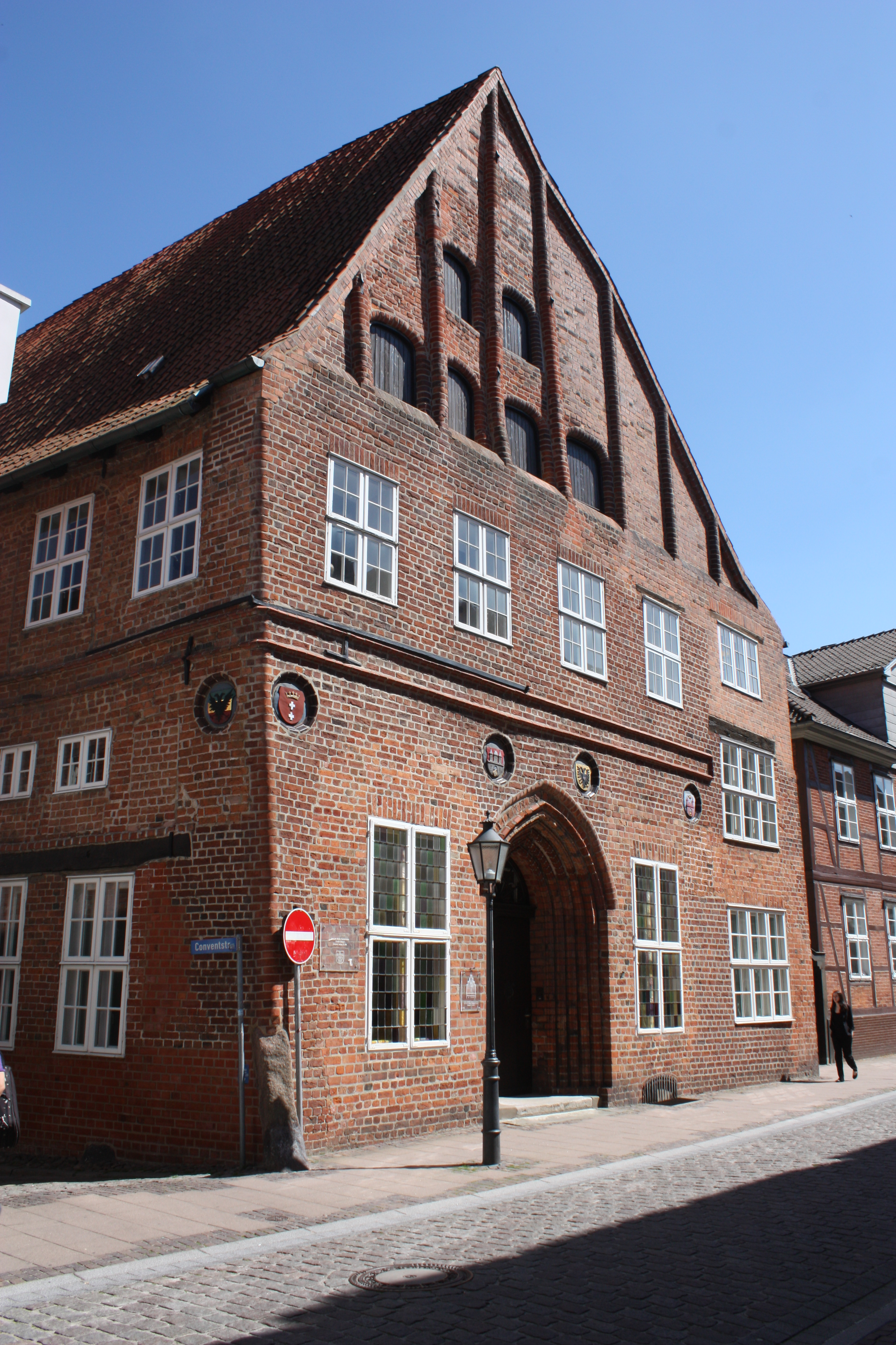 Buildings in Lüneburg